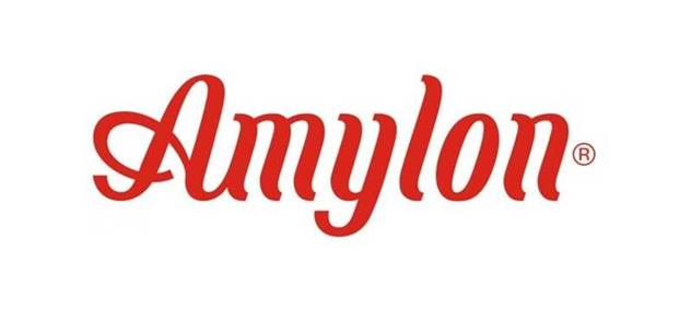 Logo Amylon (2014)